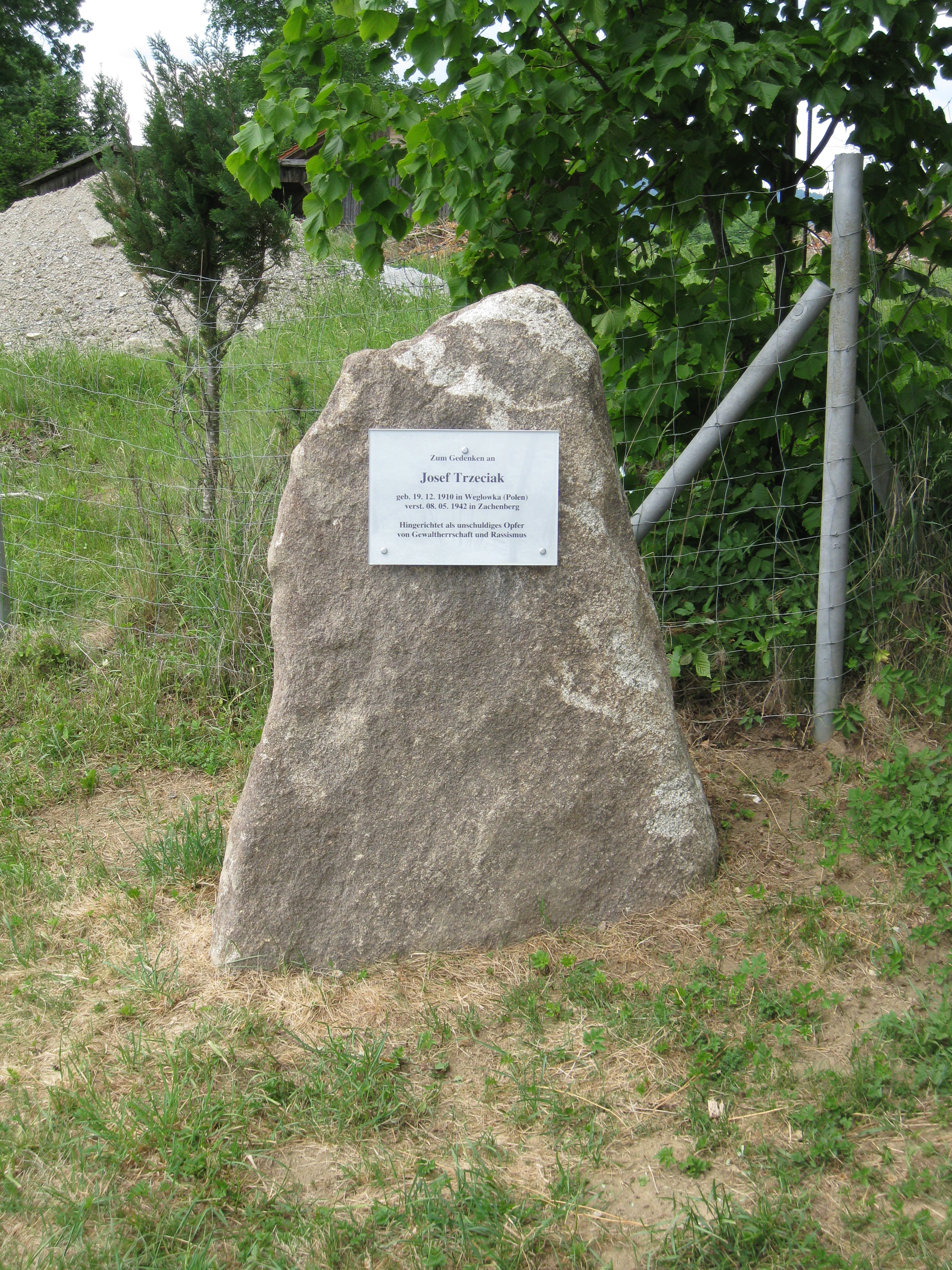 Gedenkstein für Josef Trzeciak in Zachenberg, Bayerischer Wald